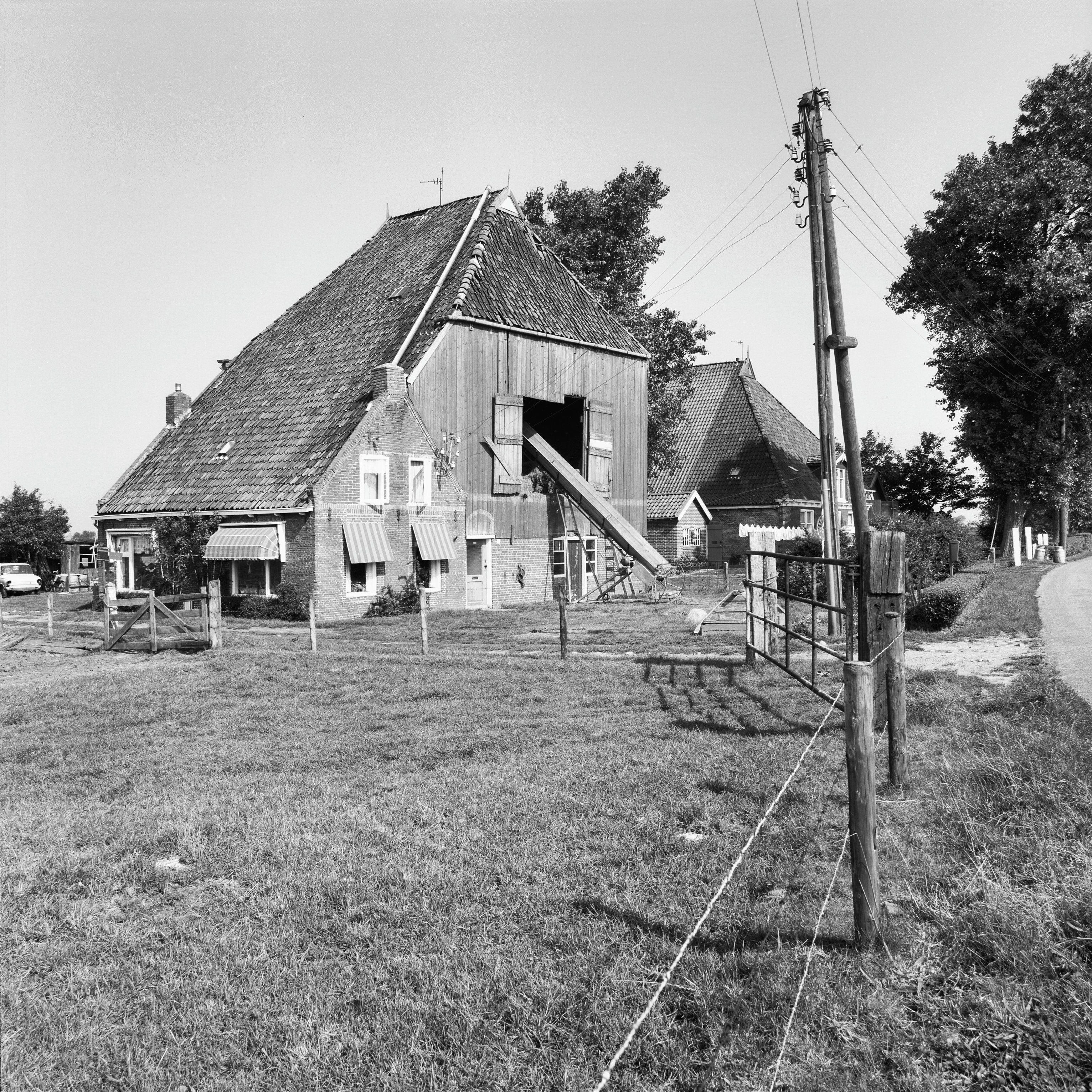 voor- en linker zijgevel